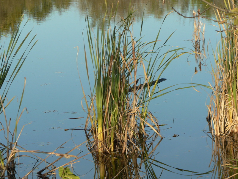 Přírodní památka V Pískovně, Dolní Počernice, Hostavice